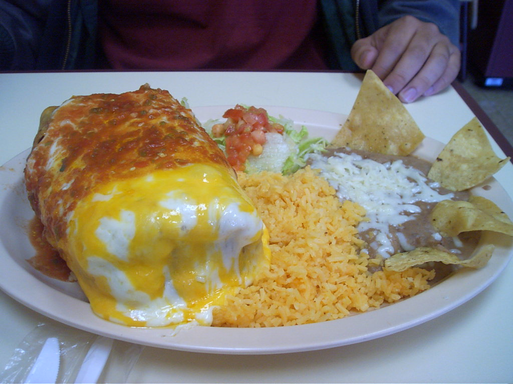 Chimichanga from a Naperville, Illinois restaurant.